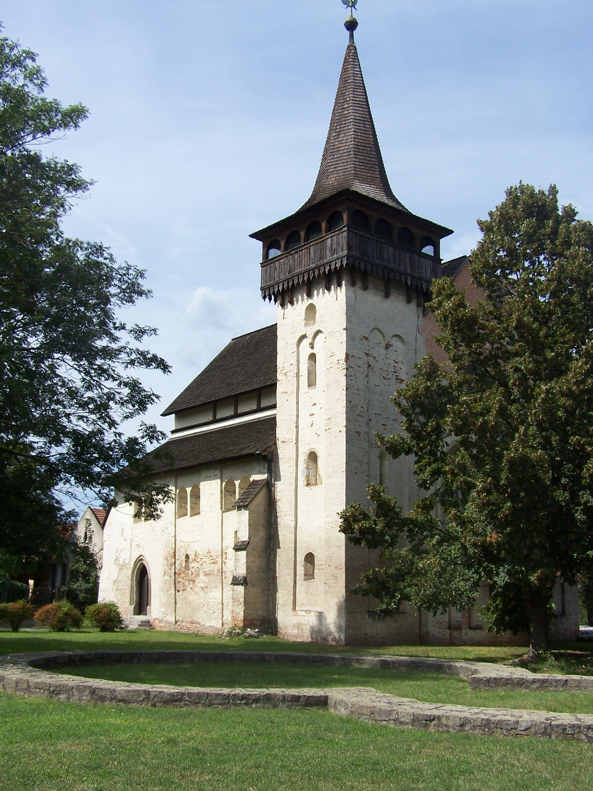 Református templom (Boldva, Szabadság tér 7 .) This is a photo of a monument in Hungary. Identifier: 2692